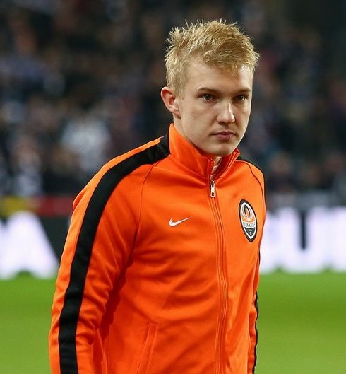 Віктор Коваленко - футболіст Шахтаря (Донецьк)